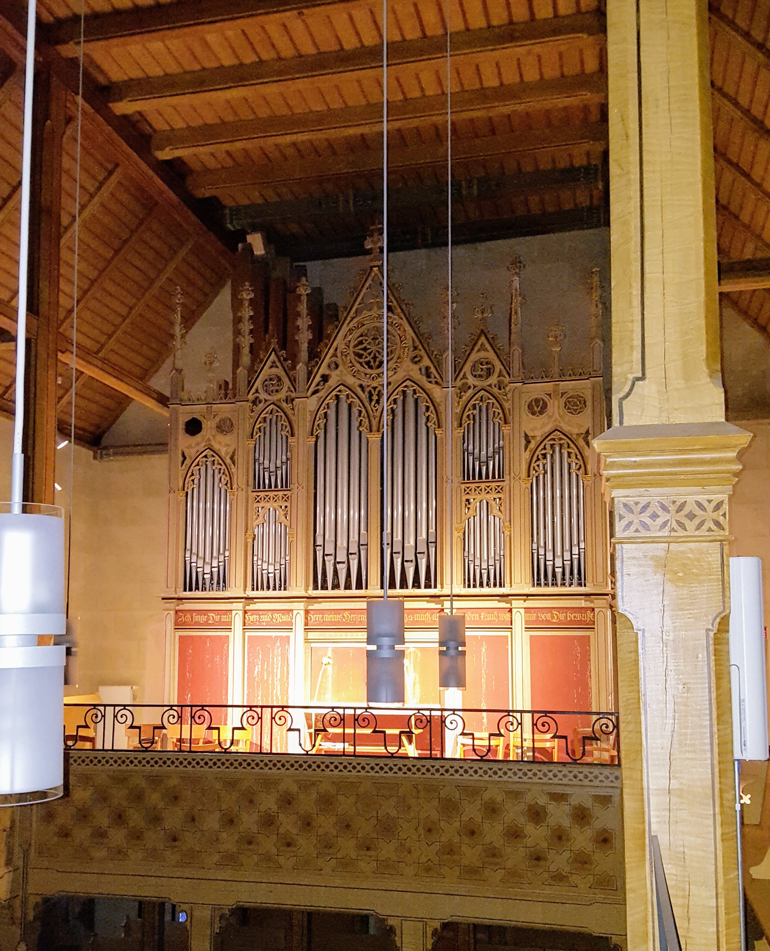 Orgel der Stadtkirche Schlieben, erbaut durch Nikolaus Schrickel, 1879 durch Conrad Geißler grundlegend umgebaut